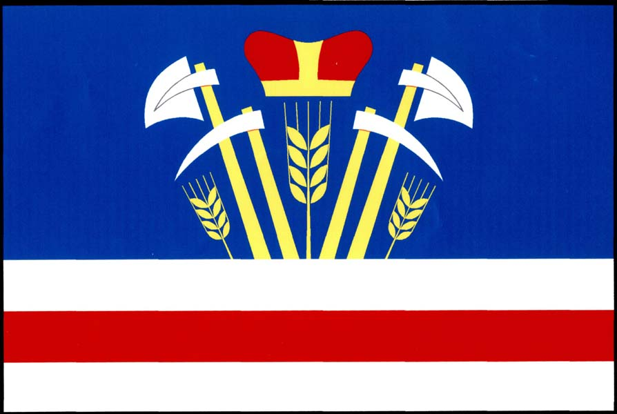 Vlajka obce Rohozná (okres Jihlava)